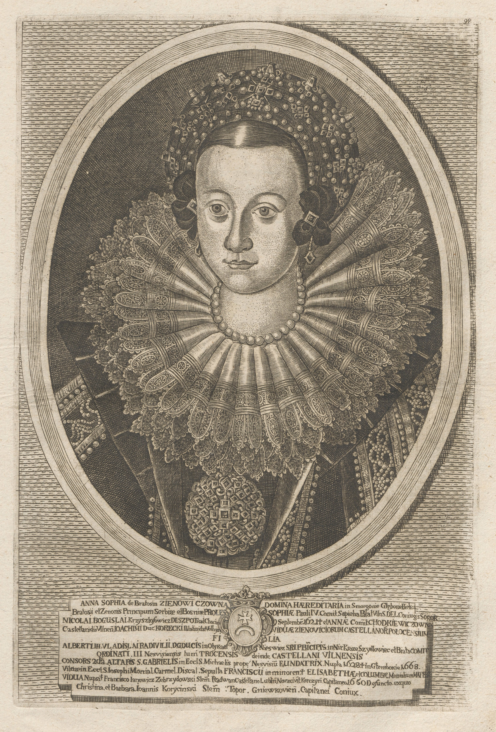 Беларуская (тарашкевіца): Партрэт Ганны Соф'і Радзівіл (Hanna Sofja Radzivił) зь Зяновічаў (Zianovič)